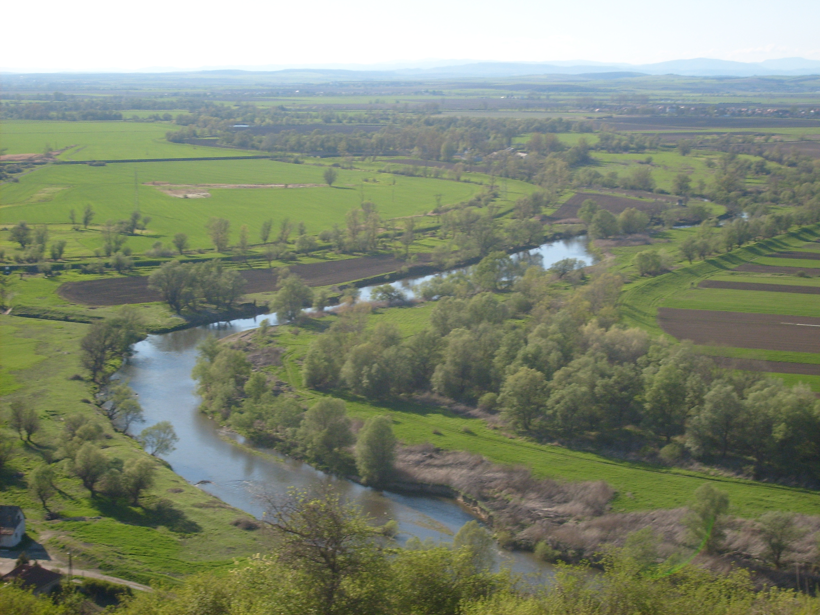 A Sajó látképe a sajónémeti Várhegyről.